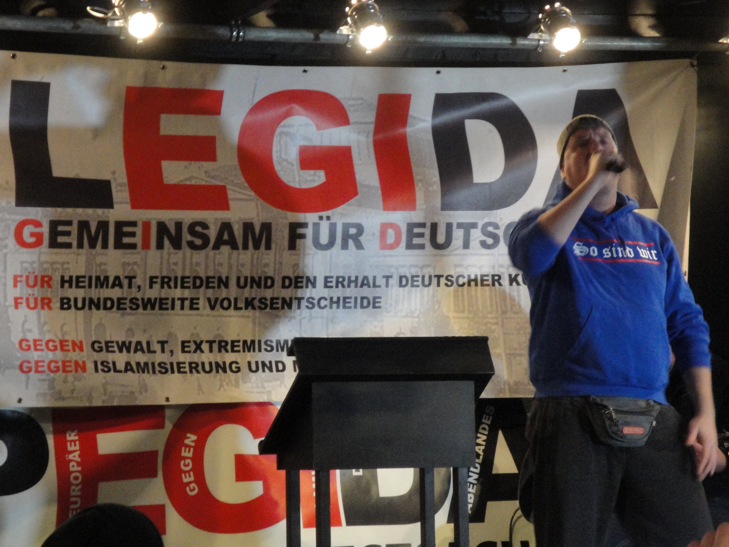 Auftritt von Hannes Ostendorf (Kategorie C – Hungrige Wölfe) bei der LEGIDA-Demonstration auf dem Stadionvorplatz